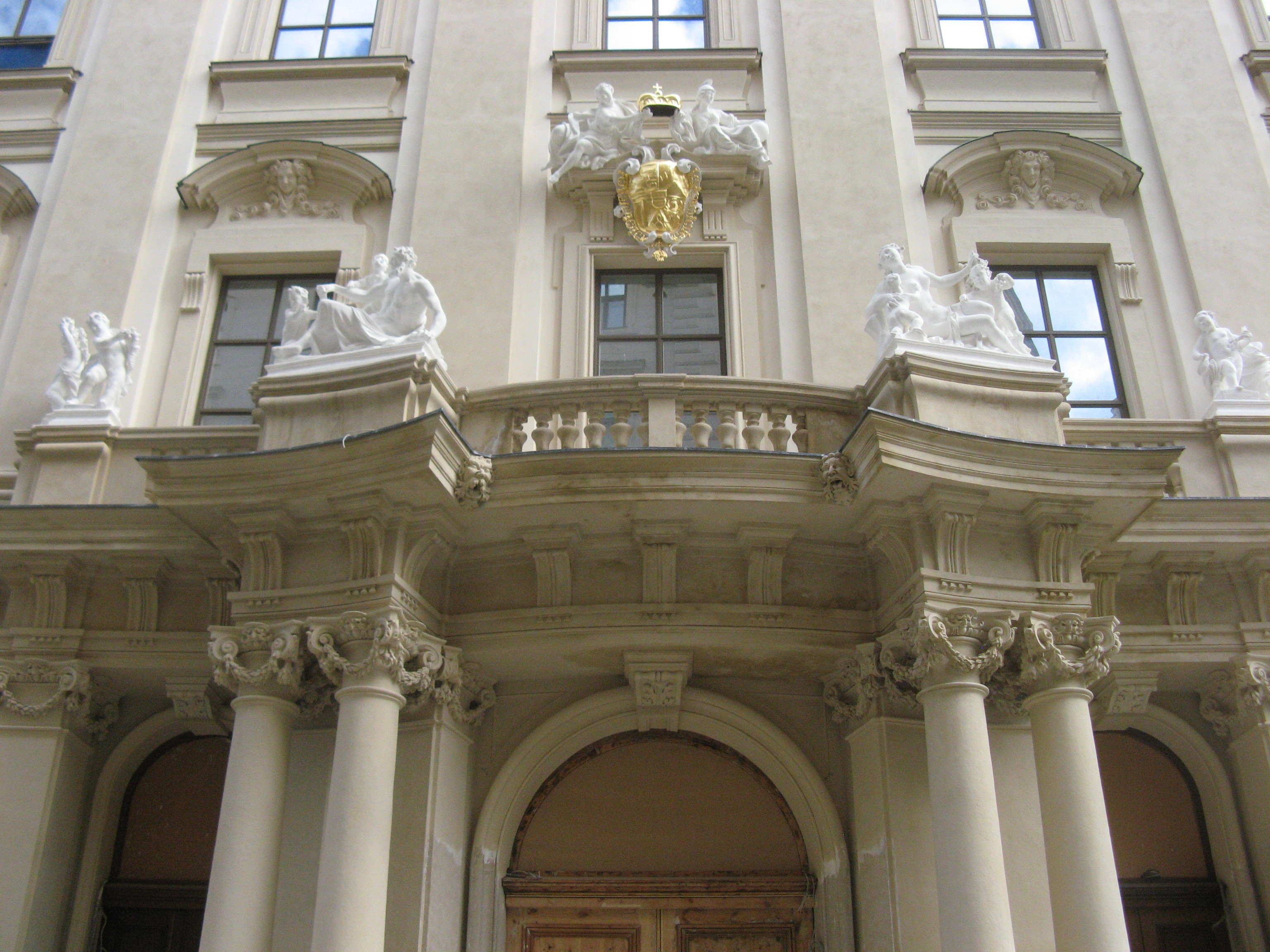 Liechtenstein-Stadtpalais, Portal, Bankgasse 9, Wien-Innere Stadt